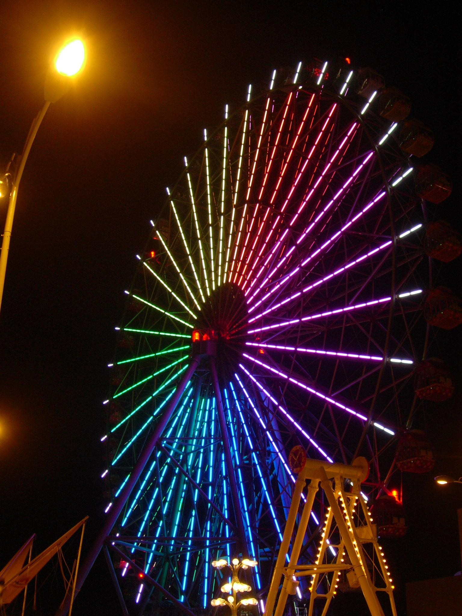 高雄市夢時代購物中心的摩天輪。